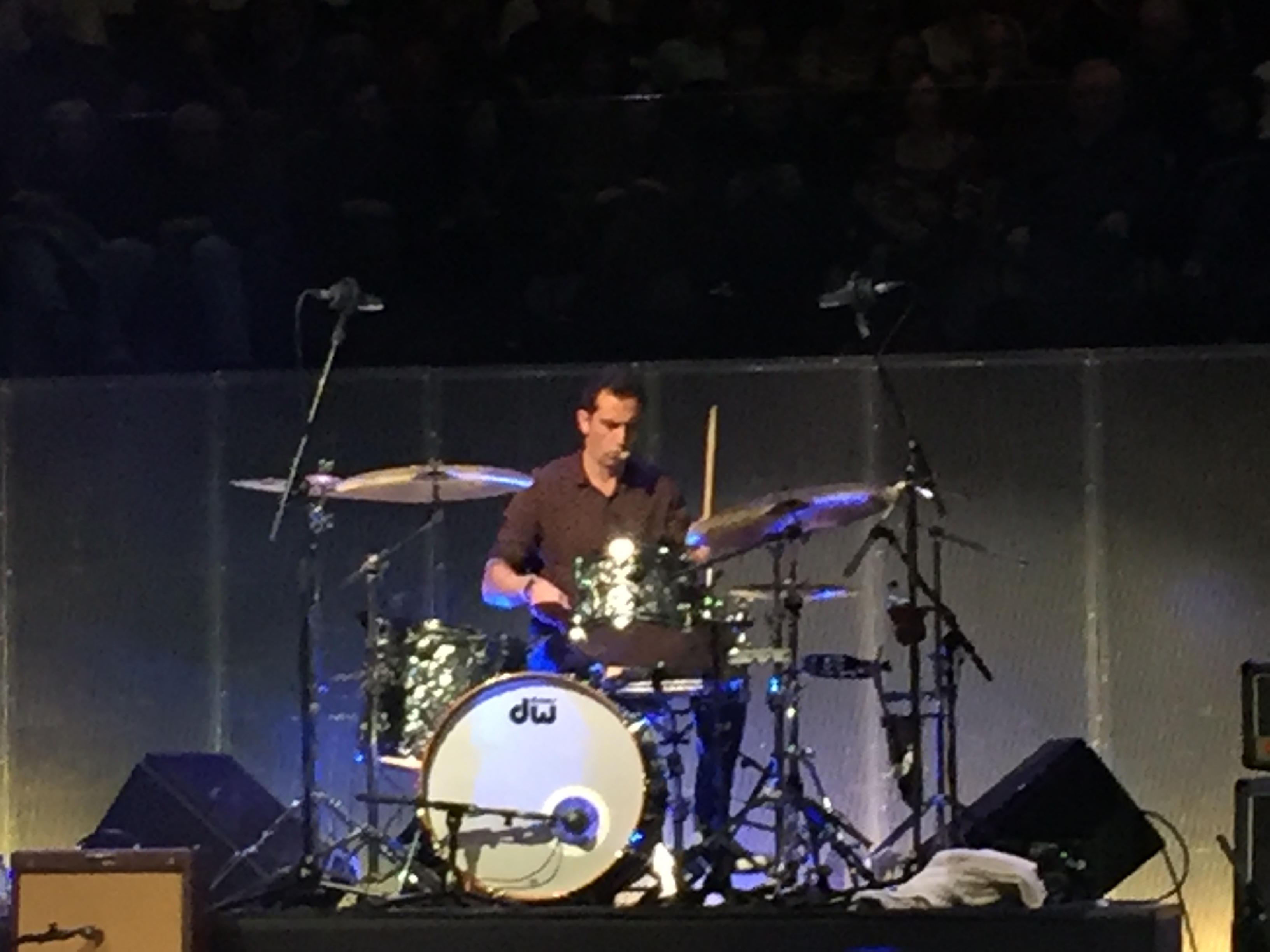 Baterista Ivan Cristiano, da banda UHF, em concerto na Casa da Música em 29-12-2018.